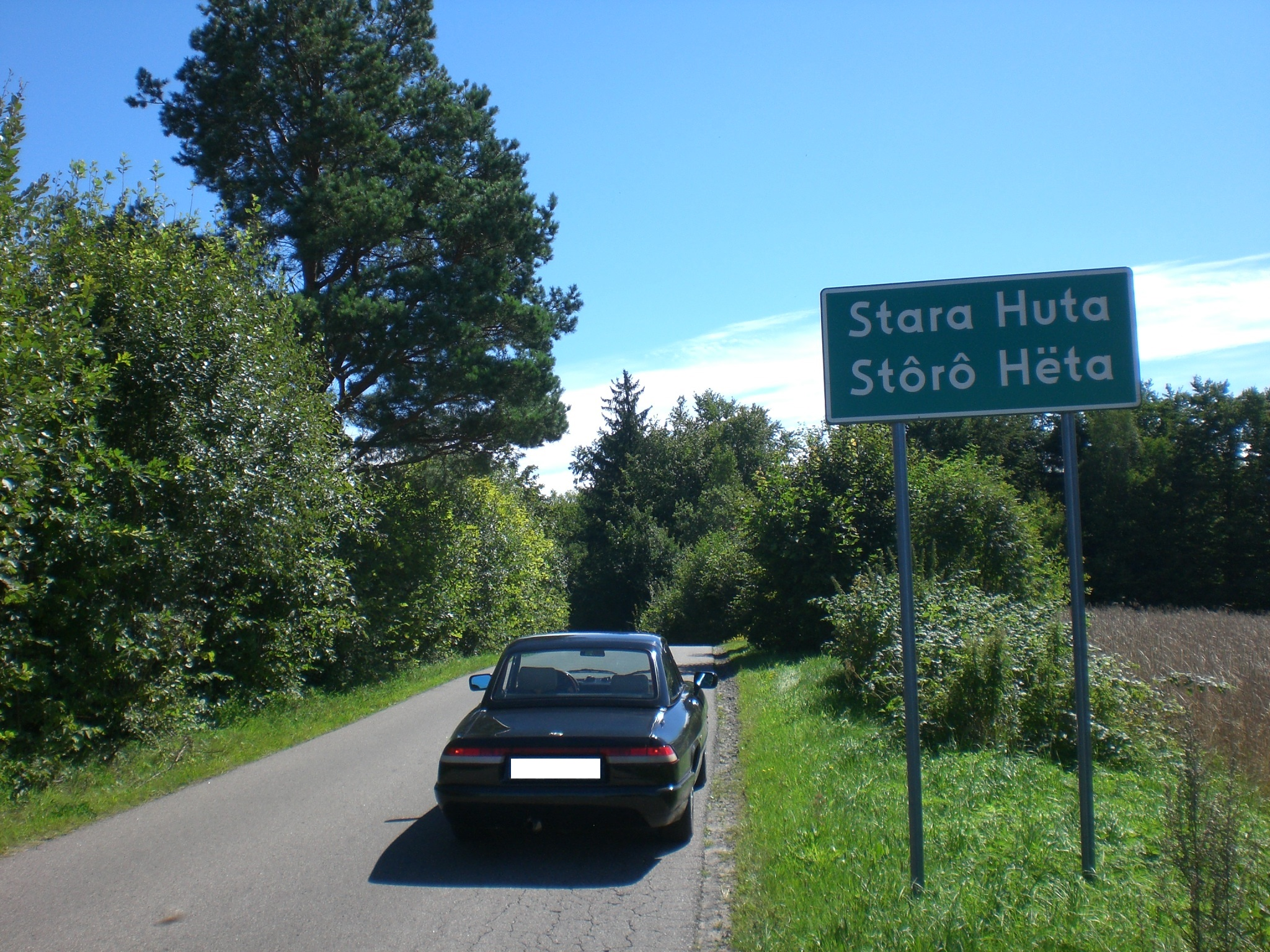 Stara Huta